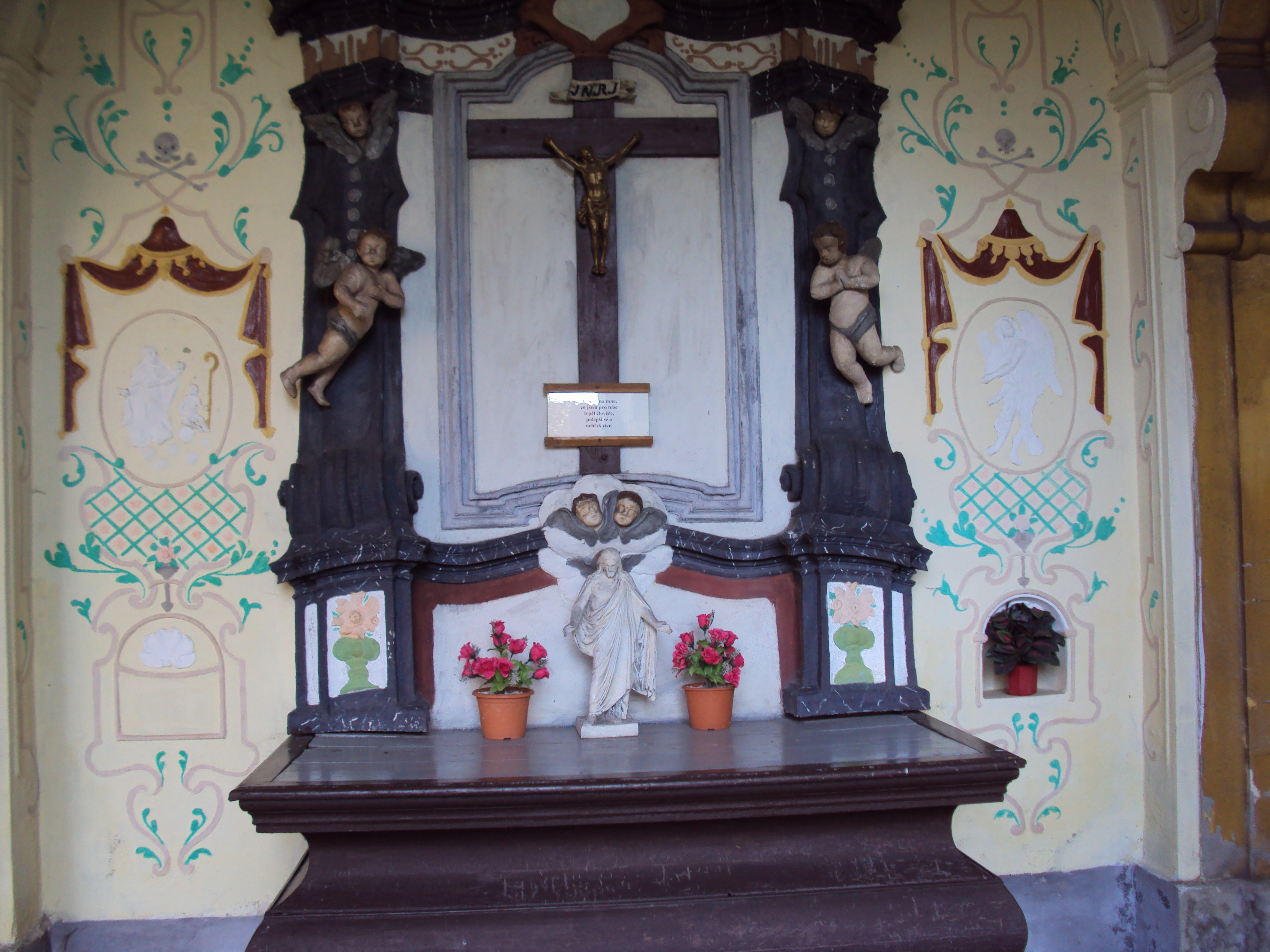 Z ambitu farního kostela v Horní Polici